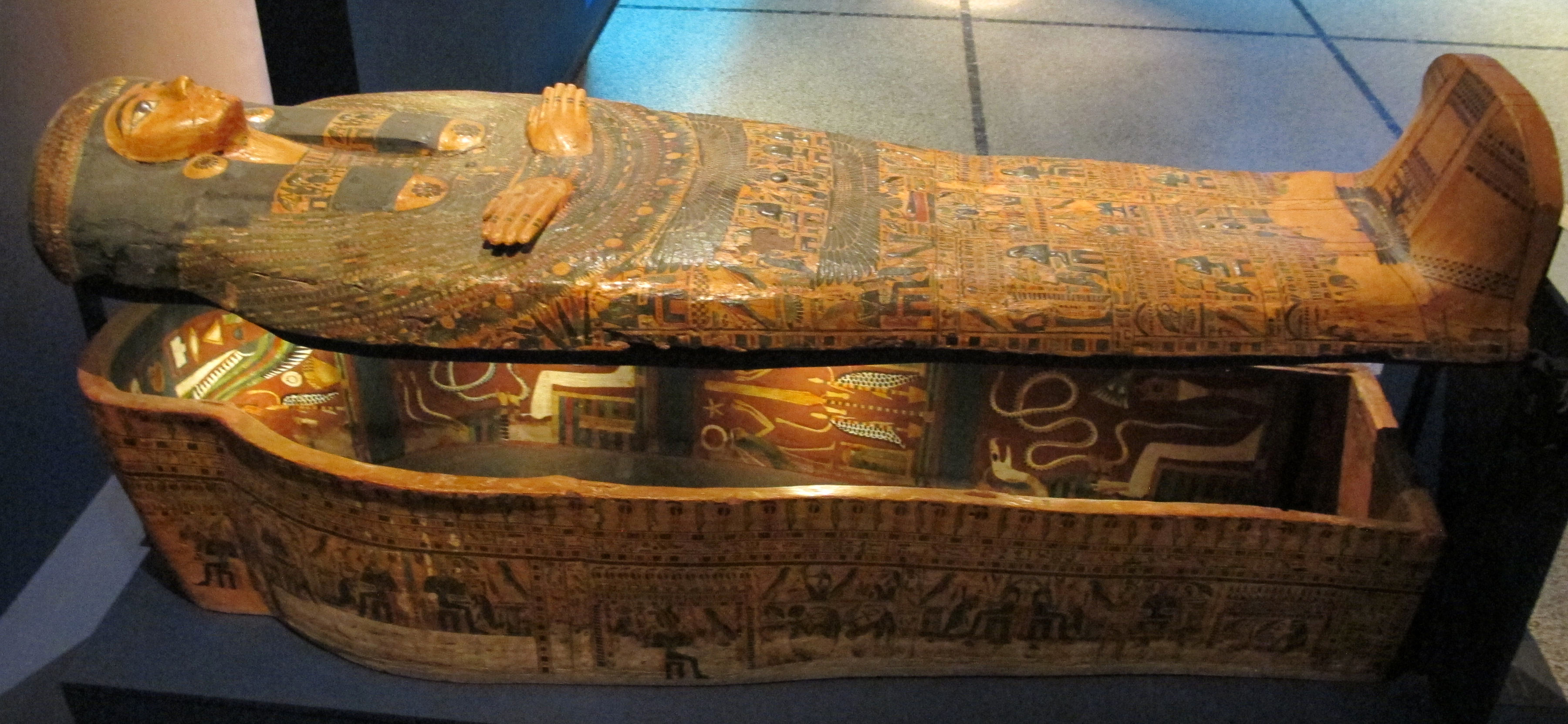 Terzo periodo intermedio, sarcofago di nobildonna tebana, 1000 ac ca., da deir el-bahari.JPG